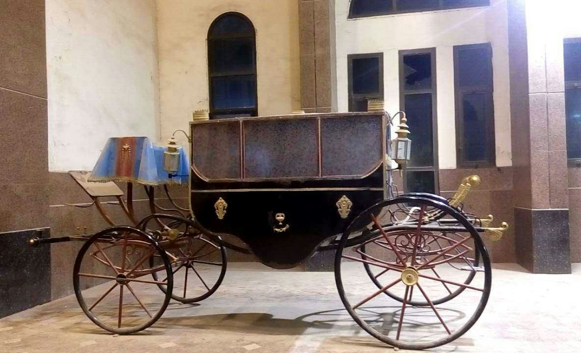 عربة الخَديوي إسماعيل موجودة في محطة قطار الإسماعيلية